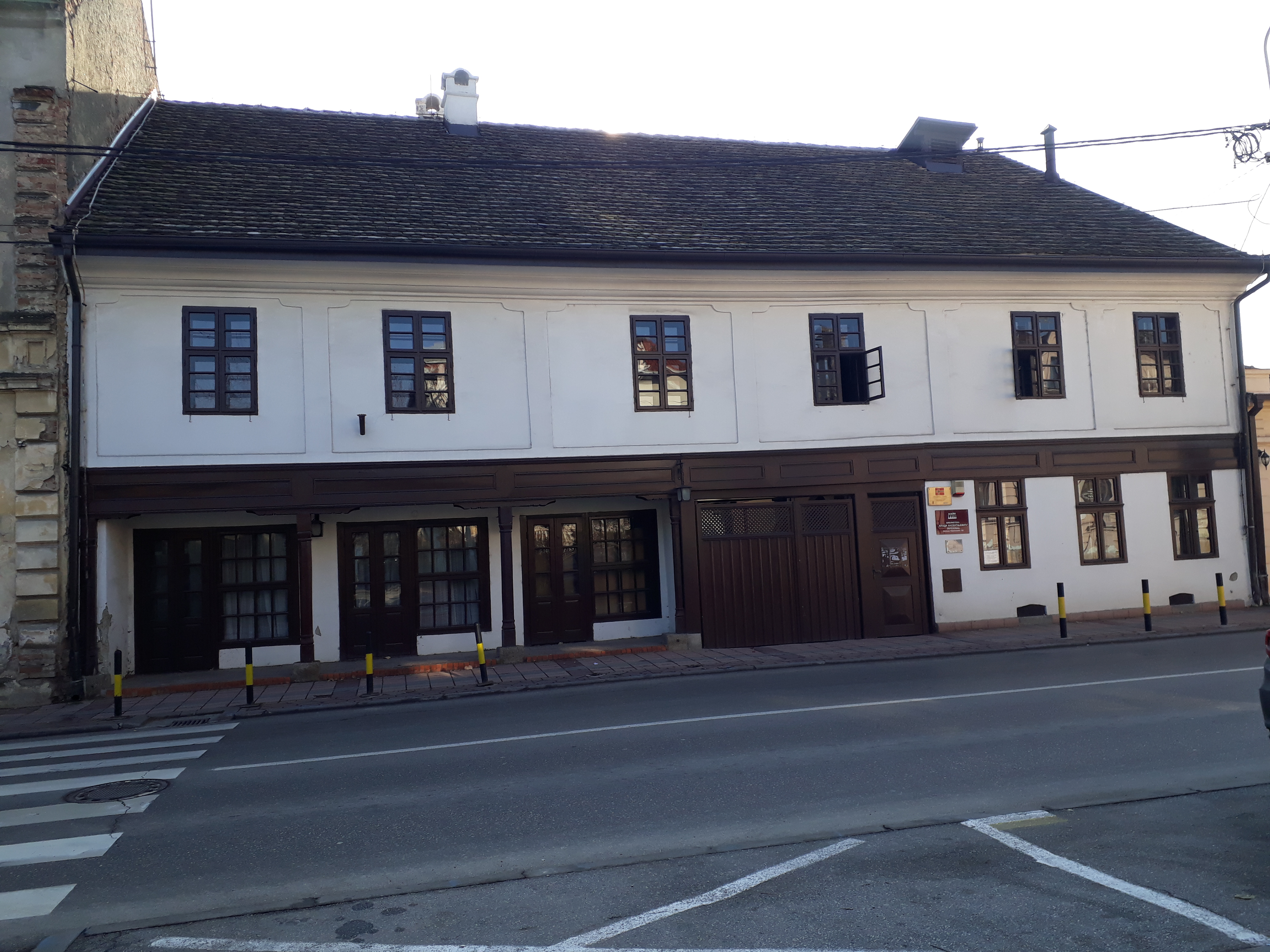 Biblioteka "Vlada Aksentijević", ObrenovacStara varoška kuća u Obrenovcu